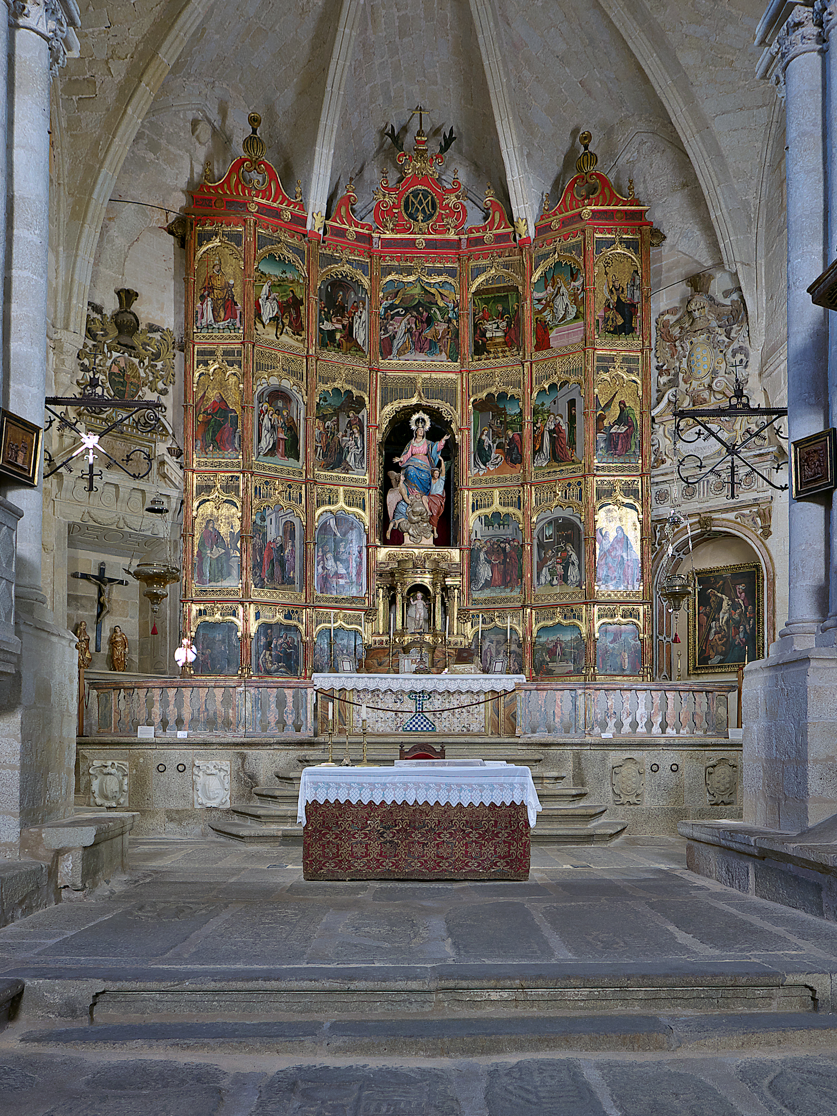 Retablo atribuido a Fernando Gallego (h. 1485)